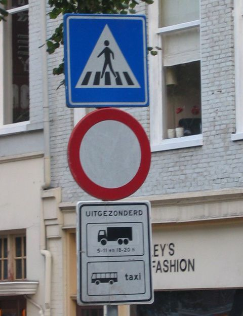 Foto door Fruggo, augustus 2004, Groningen. CC-BY.